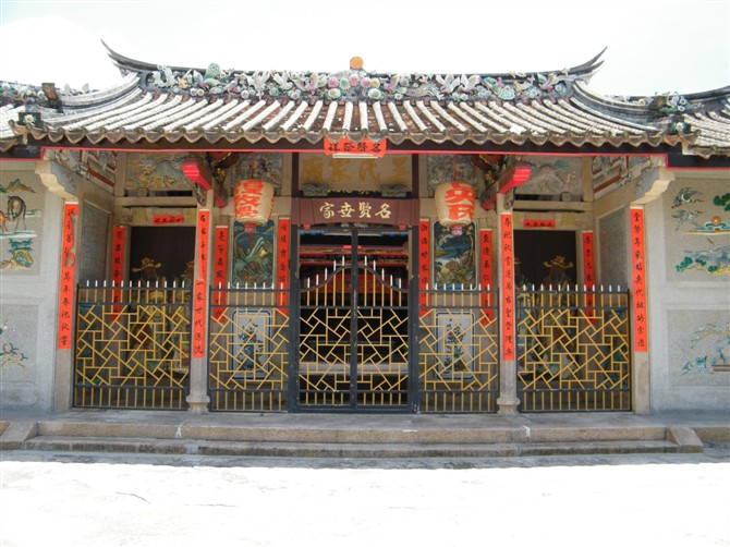 达埠 吴氏家庙